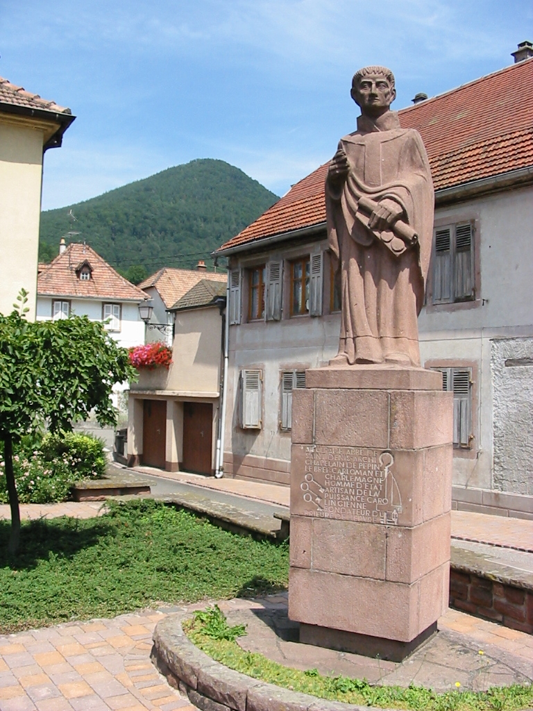 Saint Fulrade, Abbé de Lièpvre, Haut-Rhin, France